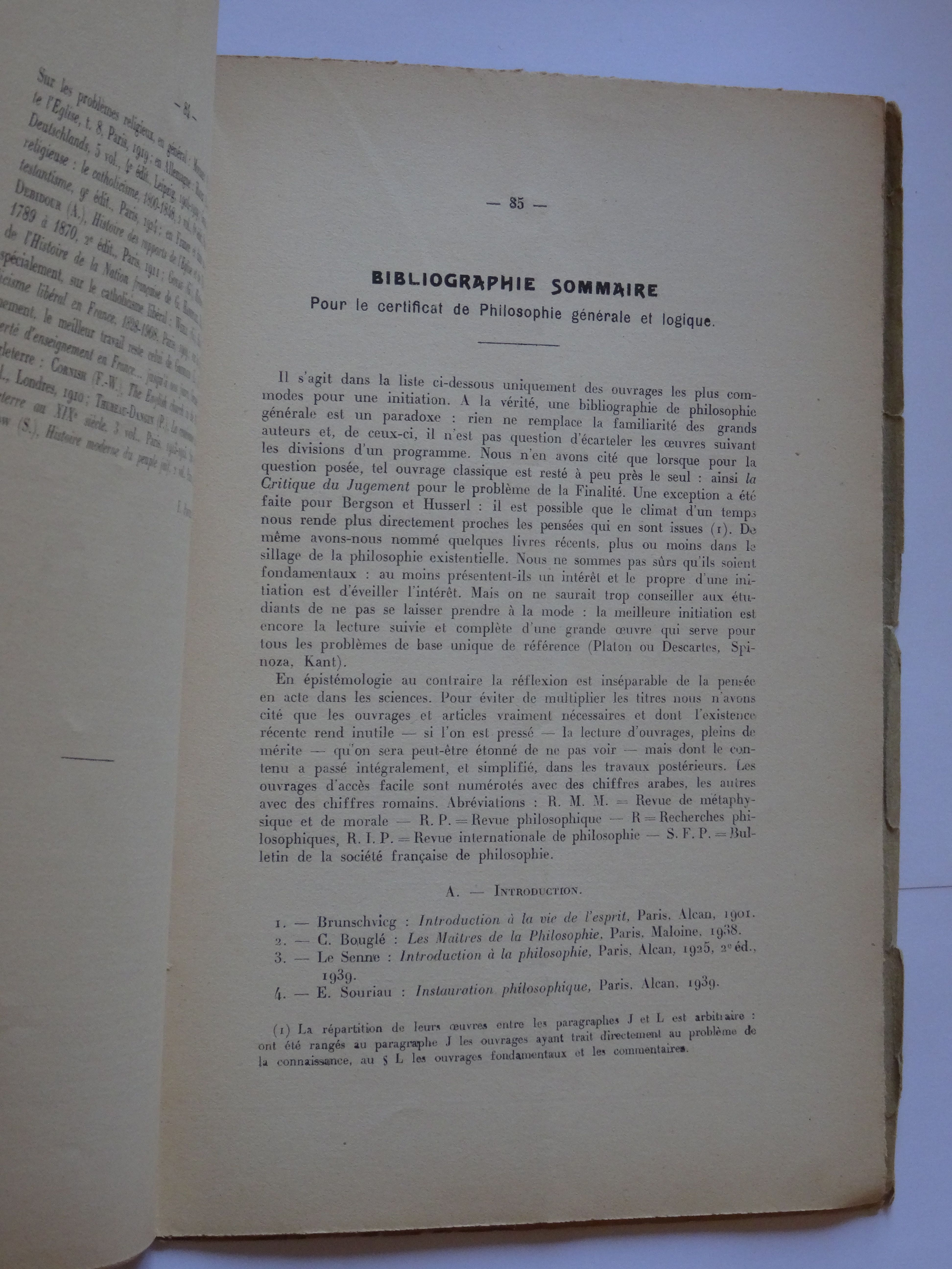 Bibliographie faite par Cavaillès pour ses cours de 1941-1942 (1re page).